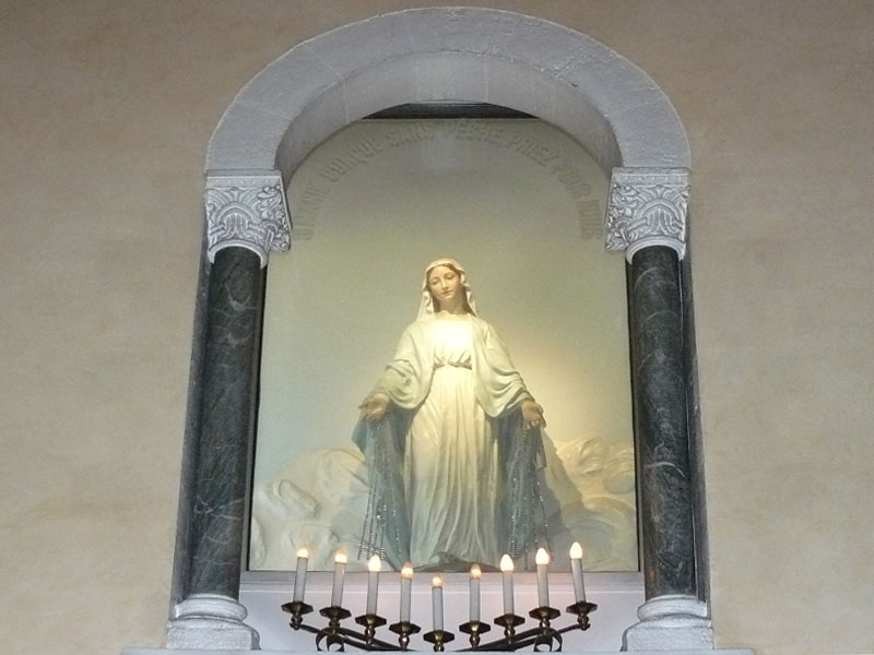 intérieur de la chapelle N.D. de La Médaille Miraculeuse à Vichy (Allier); détail de la Vierge au centre.